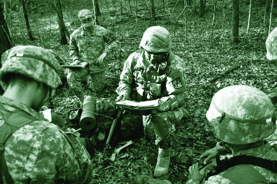 高年级学员帮助低年级学员准备夏季训练